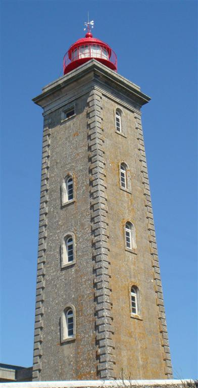 Farol de Montedor em Carreço, Viana do Castelo, Portugal Foto de Jose Goncalves